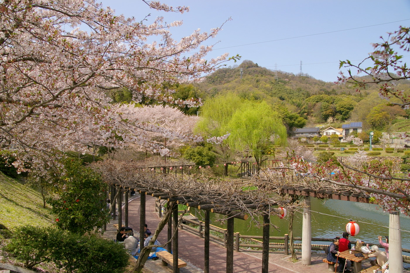 府中公園 Fuchu park